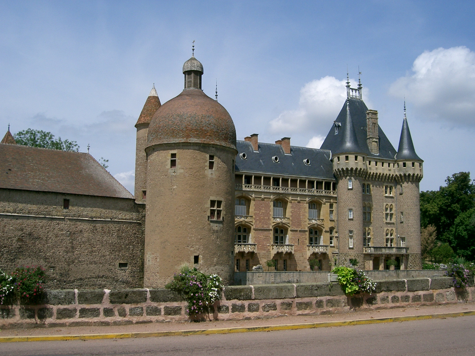 La Clayette - Bourgogne (71) - château self made PRA